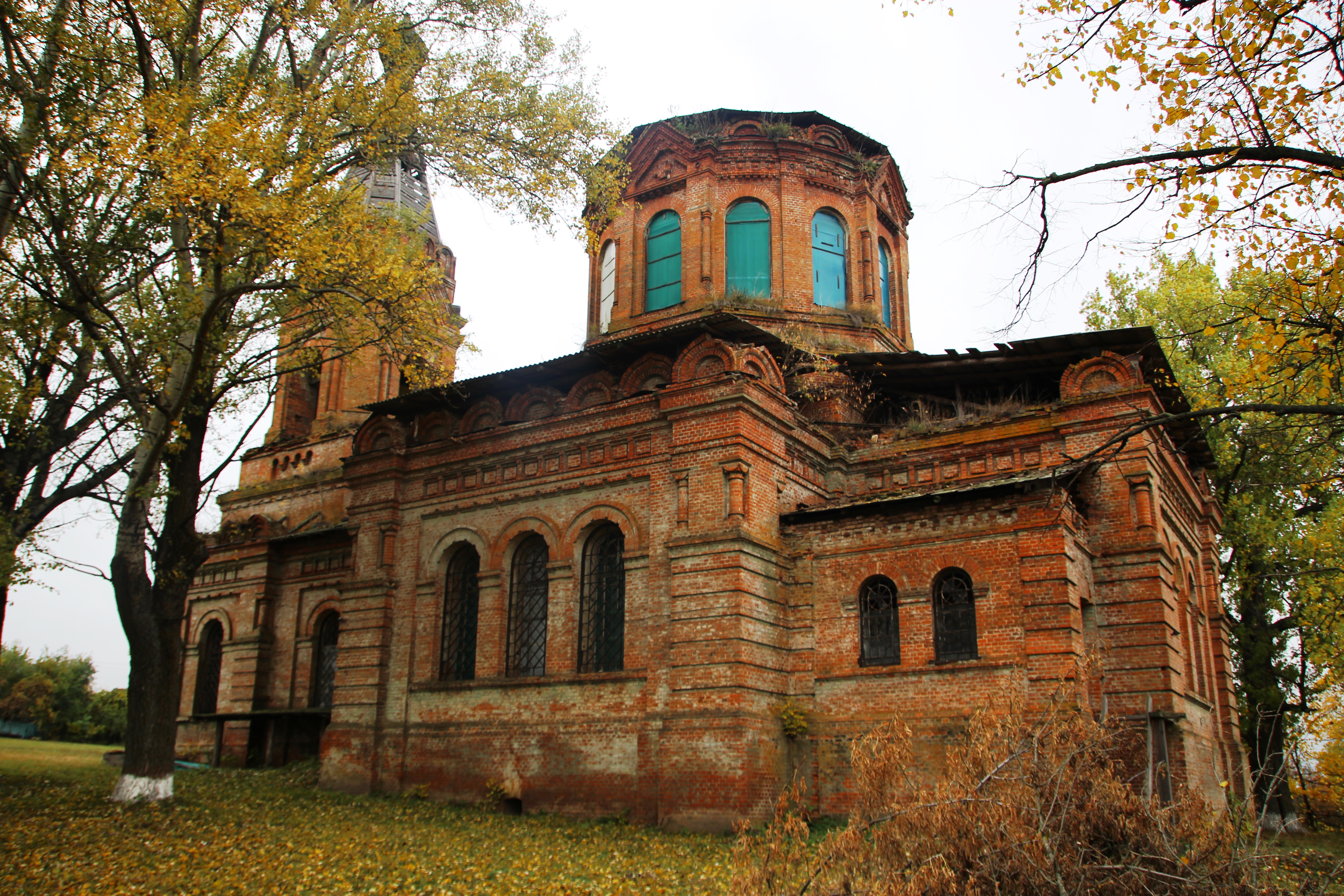 Михайлівська церква (мур.), село Малий Вистороп, вул. Лебединська, 1а